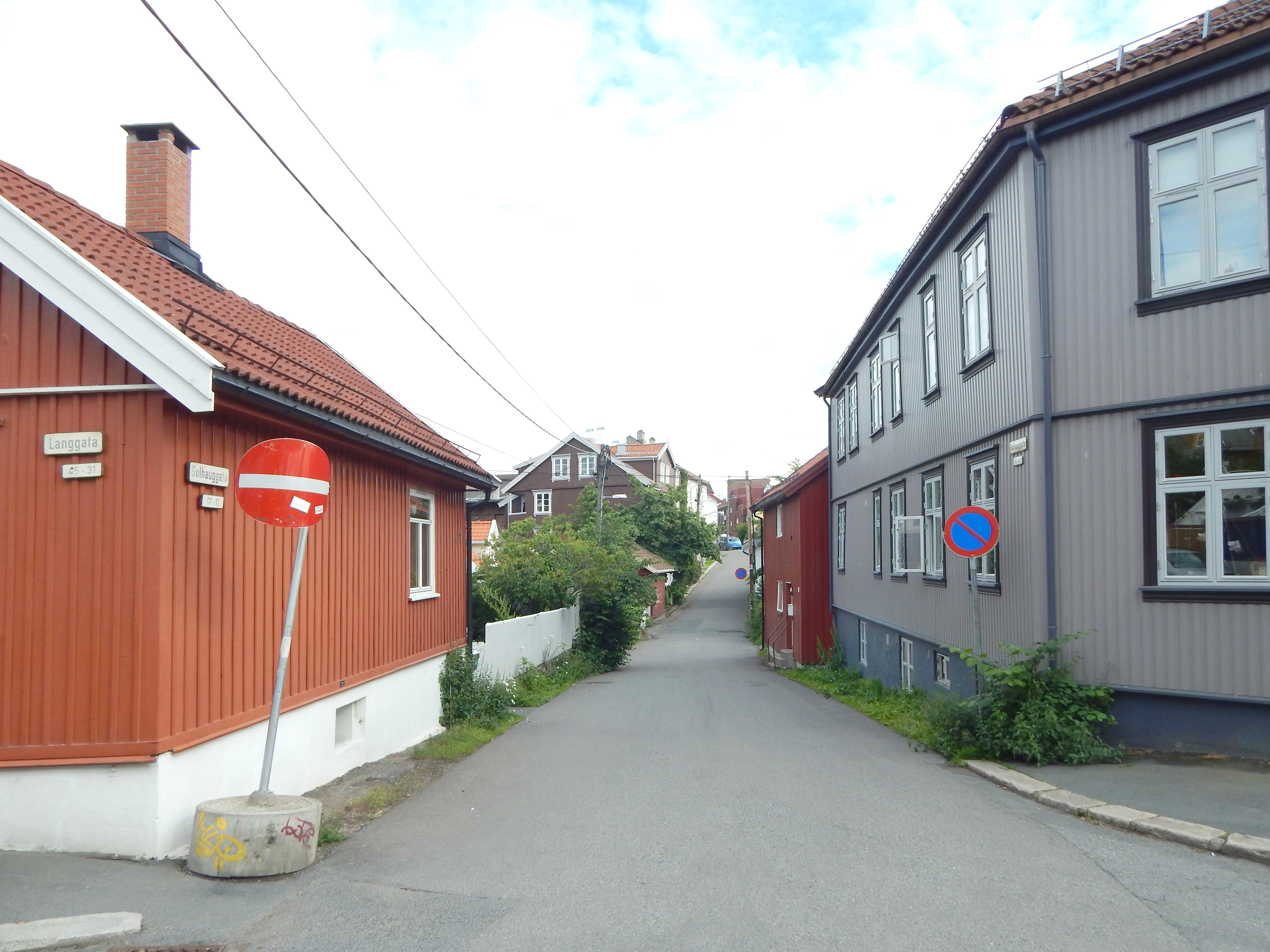 Solhauggata sett fra Langgata